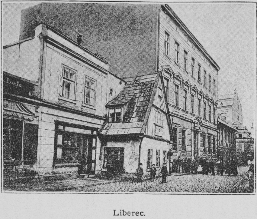 School in Liberec (Bohemia), Na Svahu street, operated by Ústřední matice školská. Cropped from File:Skoly UMS Bruner-Dvorak.png